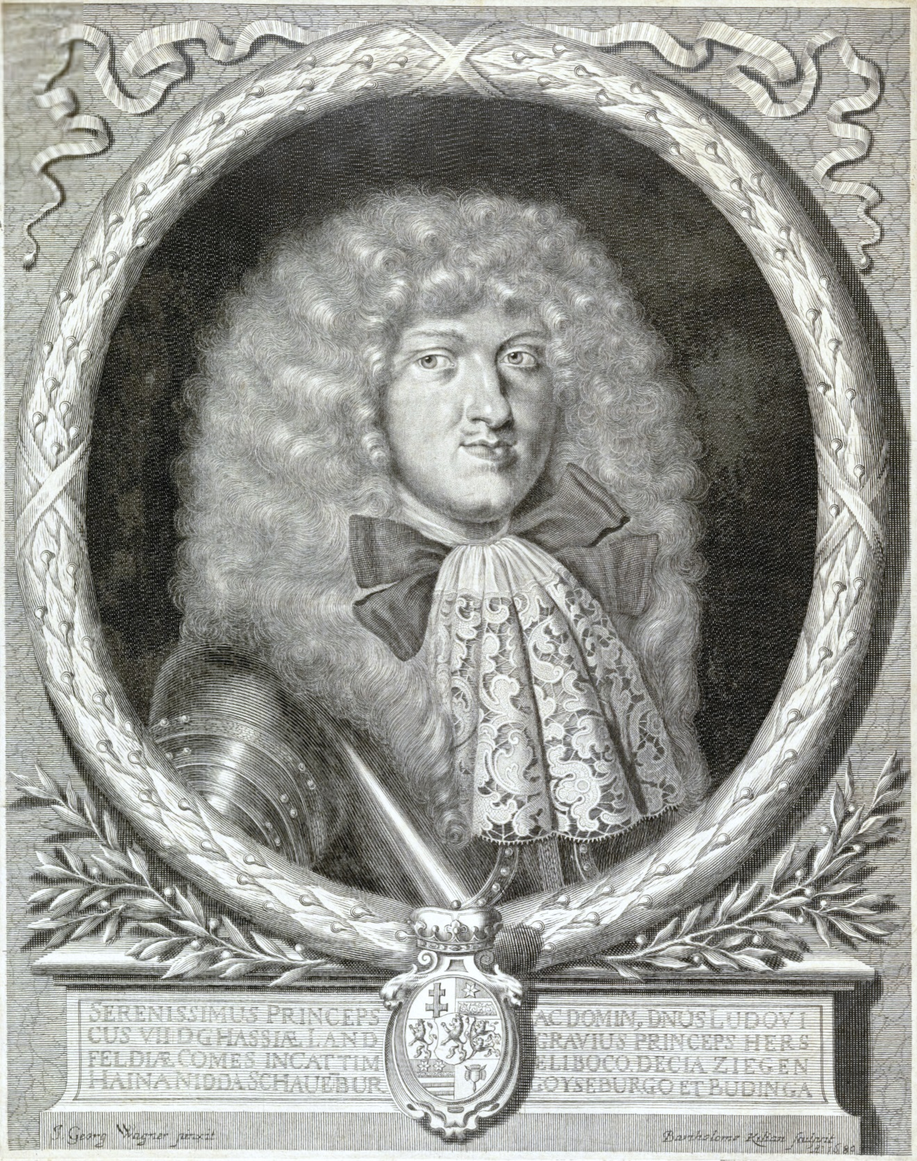 Ludwig VII. von Hessen-Darmstadt, 1658-1678